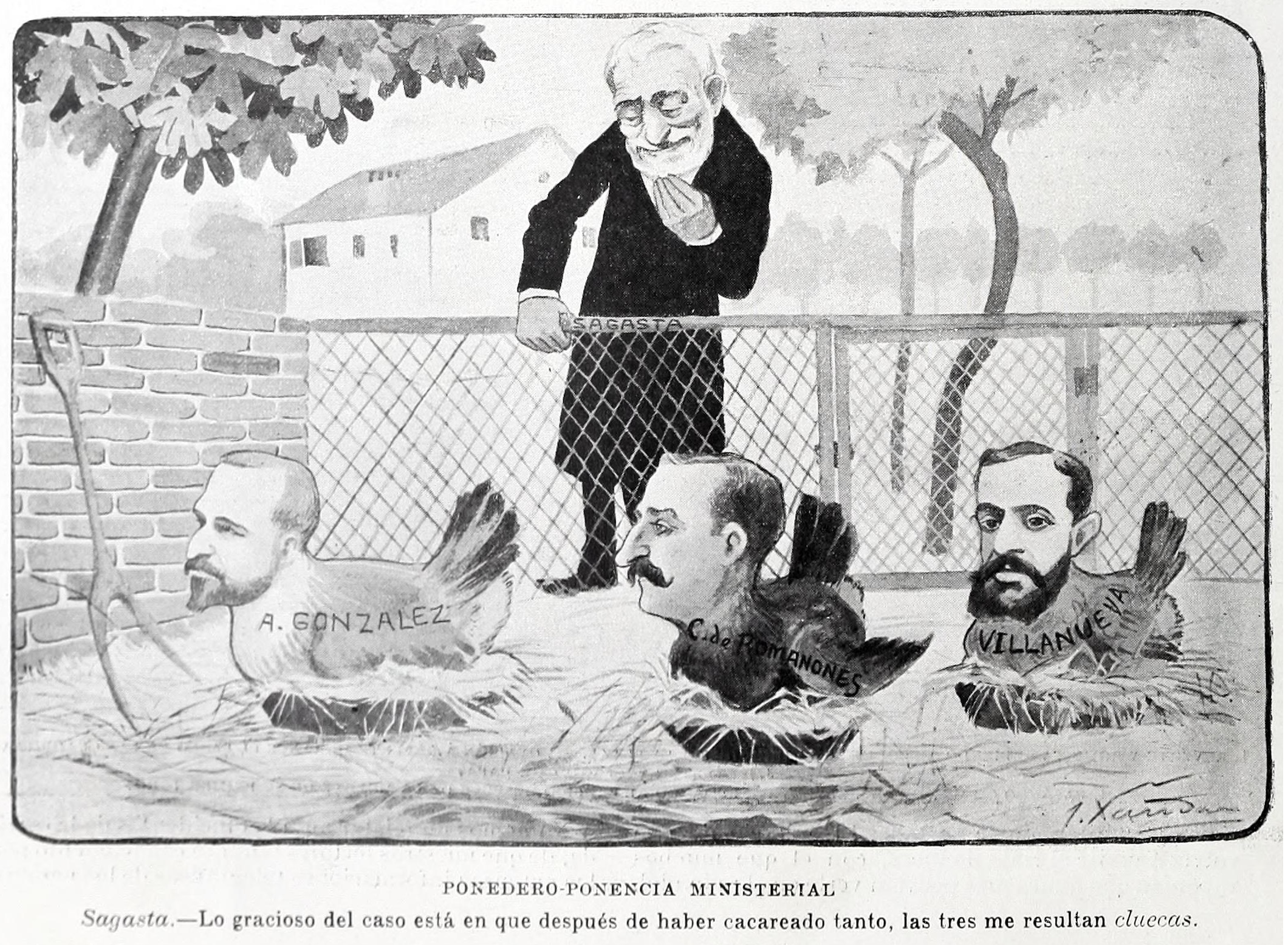 Ponedero-ponencia ministerial.